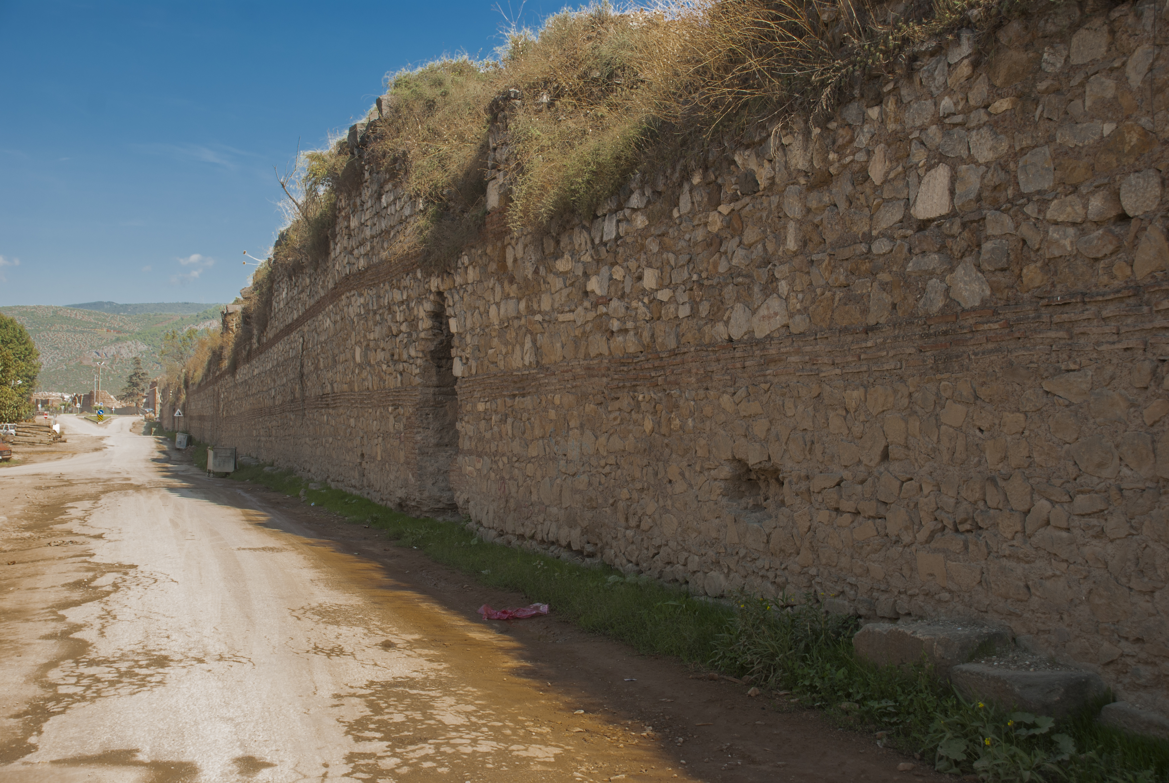 İznik surları